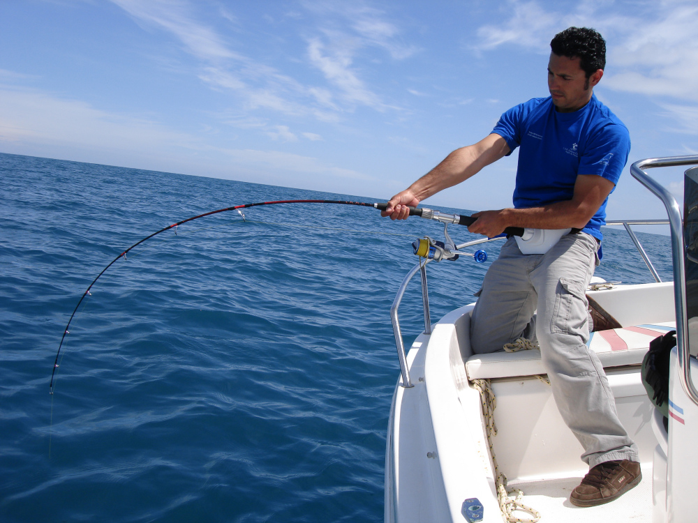 Picada en modalidad de jigging